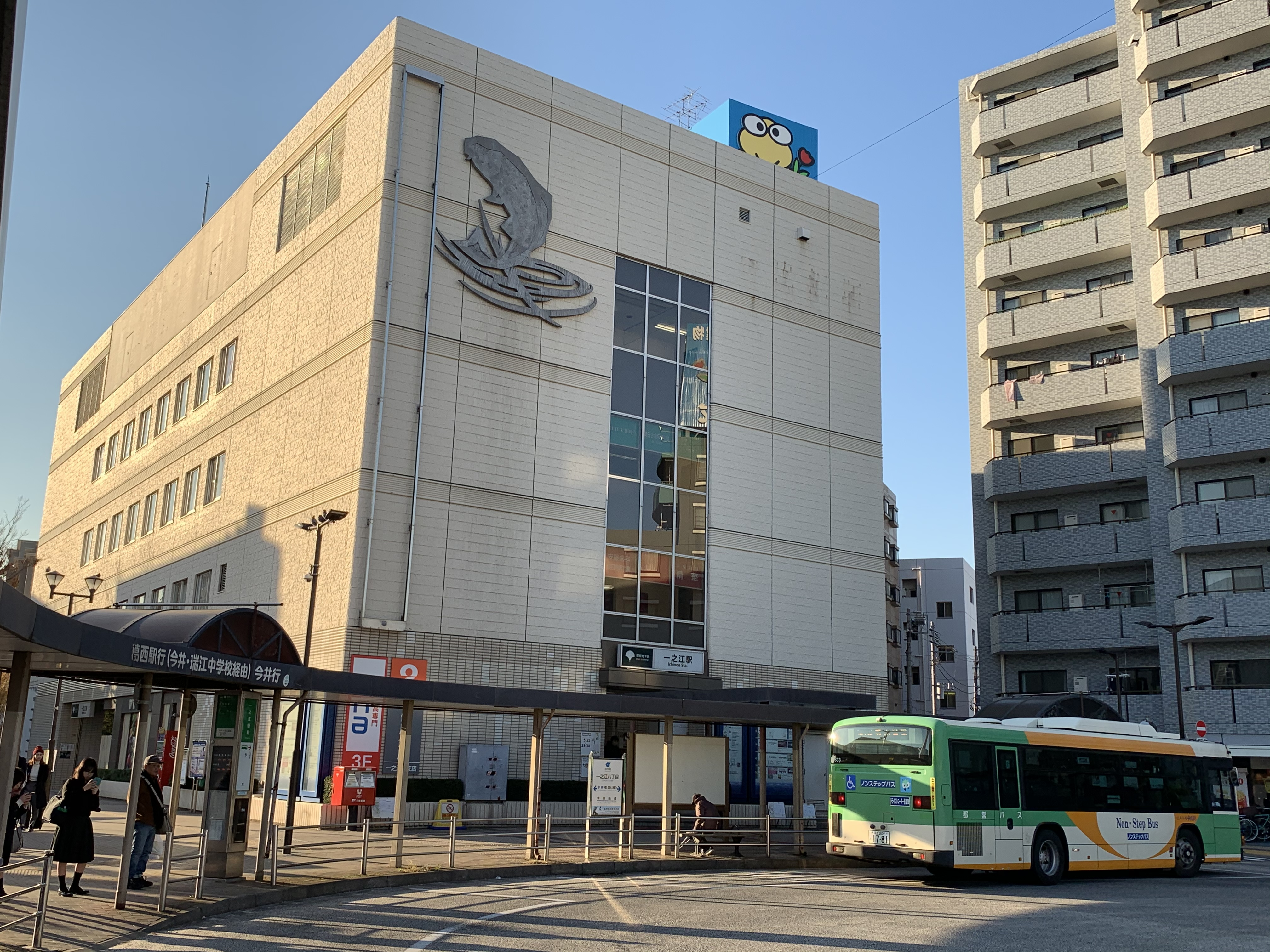 都営地下鉄新宿線一之江駅駅ビルを一之江駅前バス停から撮影